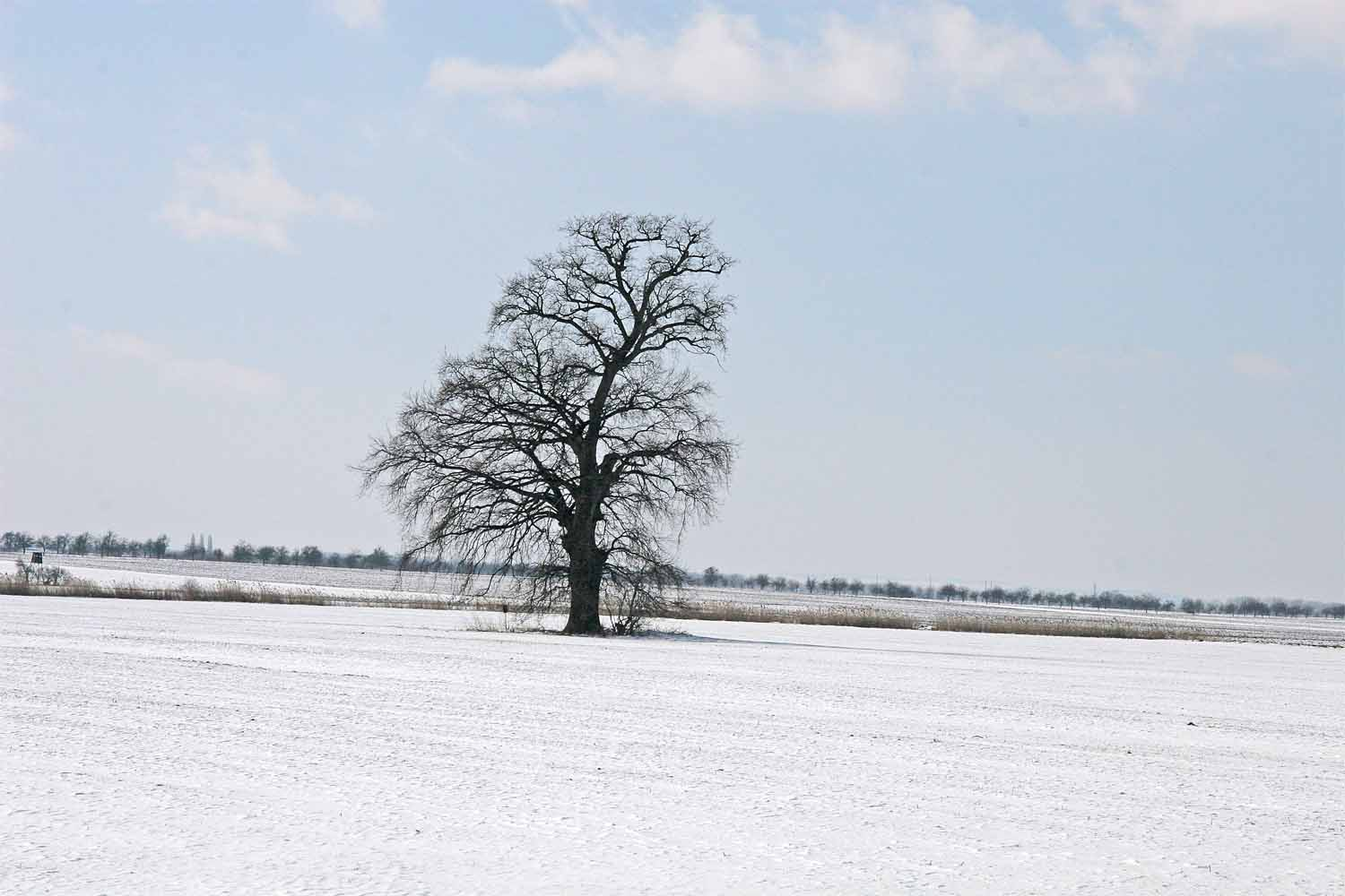 Památný dub u obce Horní Bučice